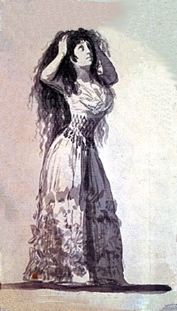 Dibujo del Álbum de Sanlucar.